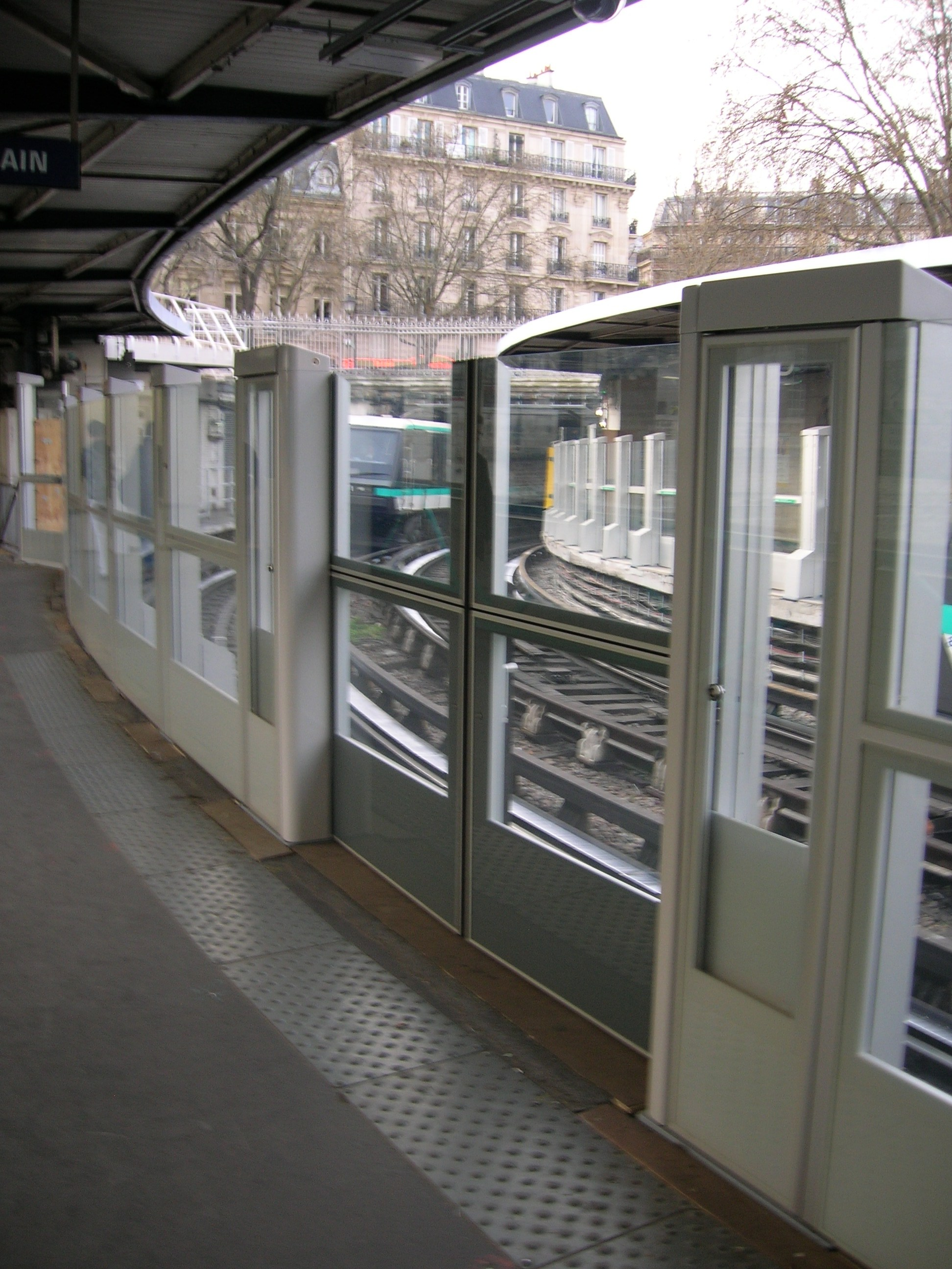 Début de la pose des portes palières à la station Bastille de la ligne 1 du métro de Paris